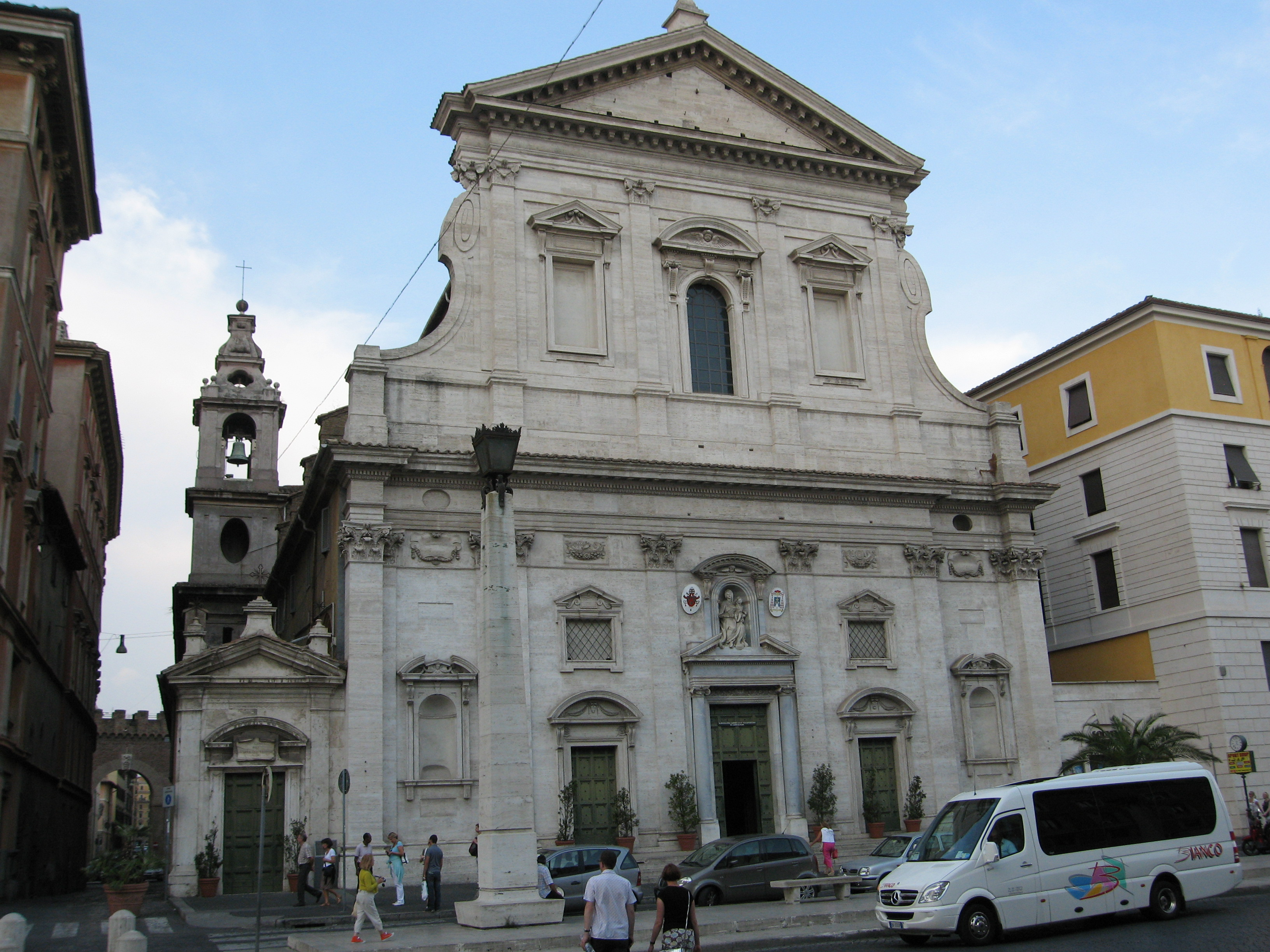 Chiesa di Santa Maria in Transpontina